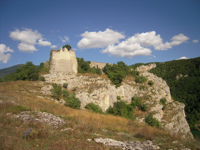 Тврђава Бочац